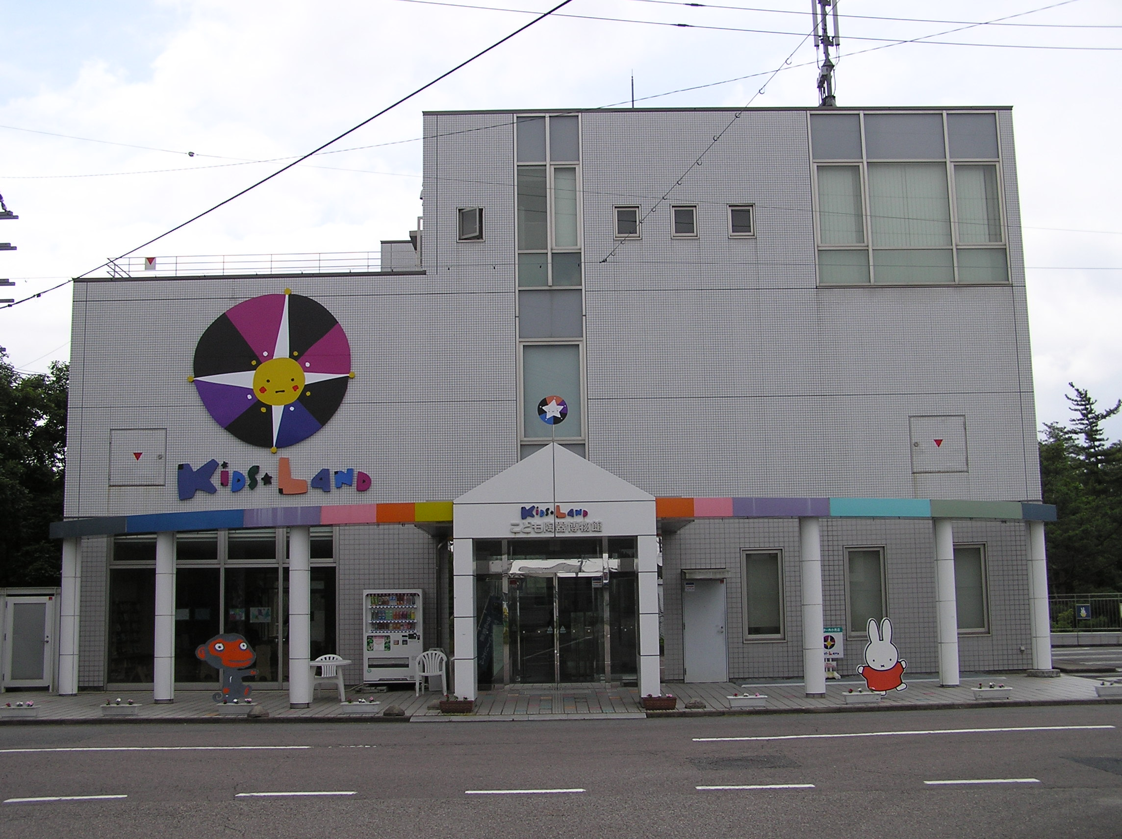 こども陶器博物館（岐阜県多治見市）